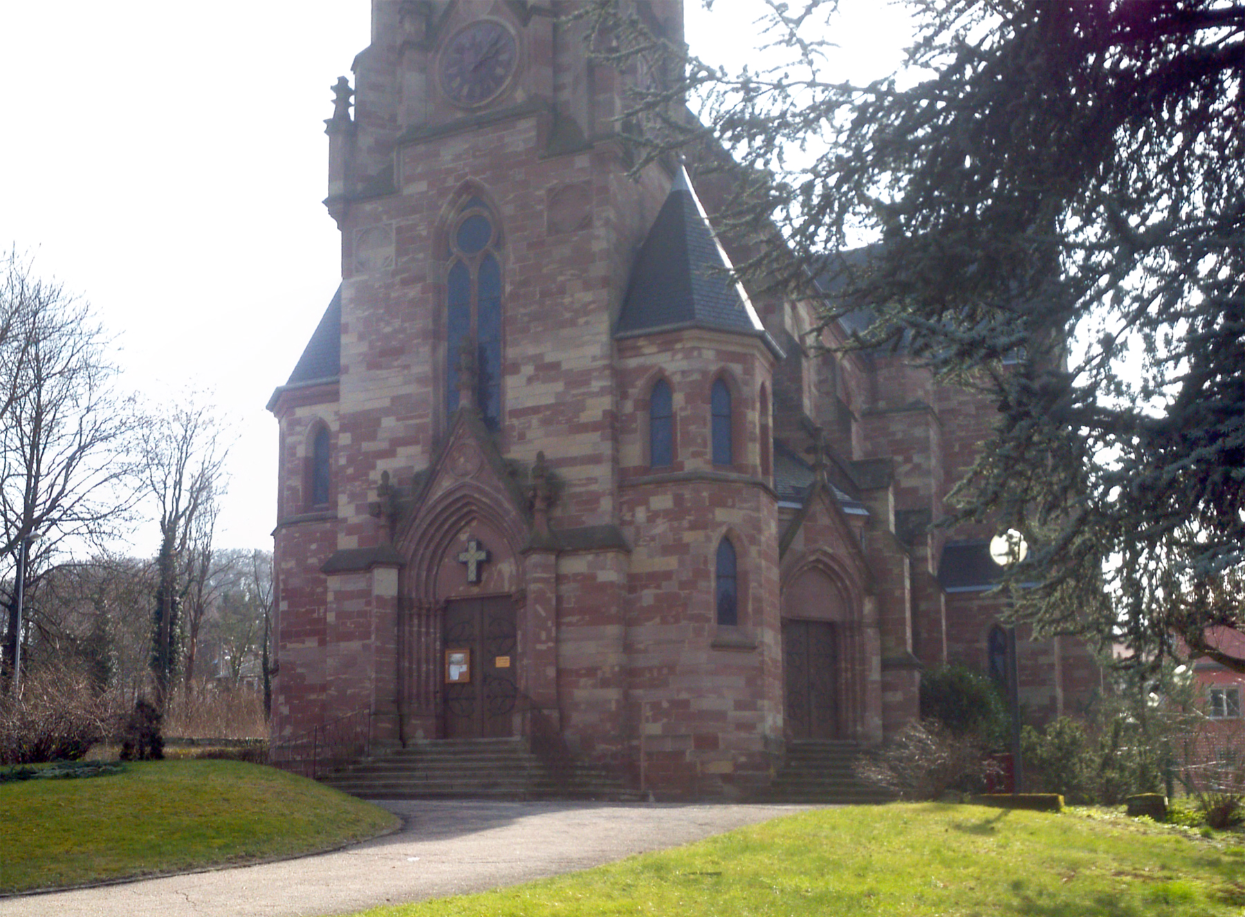 Protestantisch-lutherische Pfarrkirche Forbach, Nordwestfassade